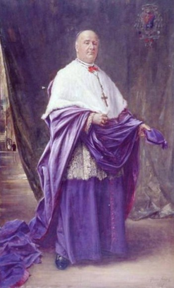 Photographie du portrait de Mgr Fédéric-Henri Oury (1842-1921), successivement vicaire de La Ferté-Bernard (Sarthe), aumônier de la Marine (Bretagne), évêque de Guadeloupe, de Fréjus (Var), et de Dijon (Côte-d'Or), archevêque d'Alger (Algérie), archevêque émérite d'Alger, et archevêque titulaire de Ptolémaïs (Egypte).